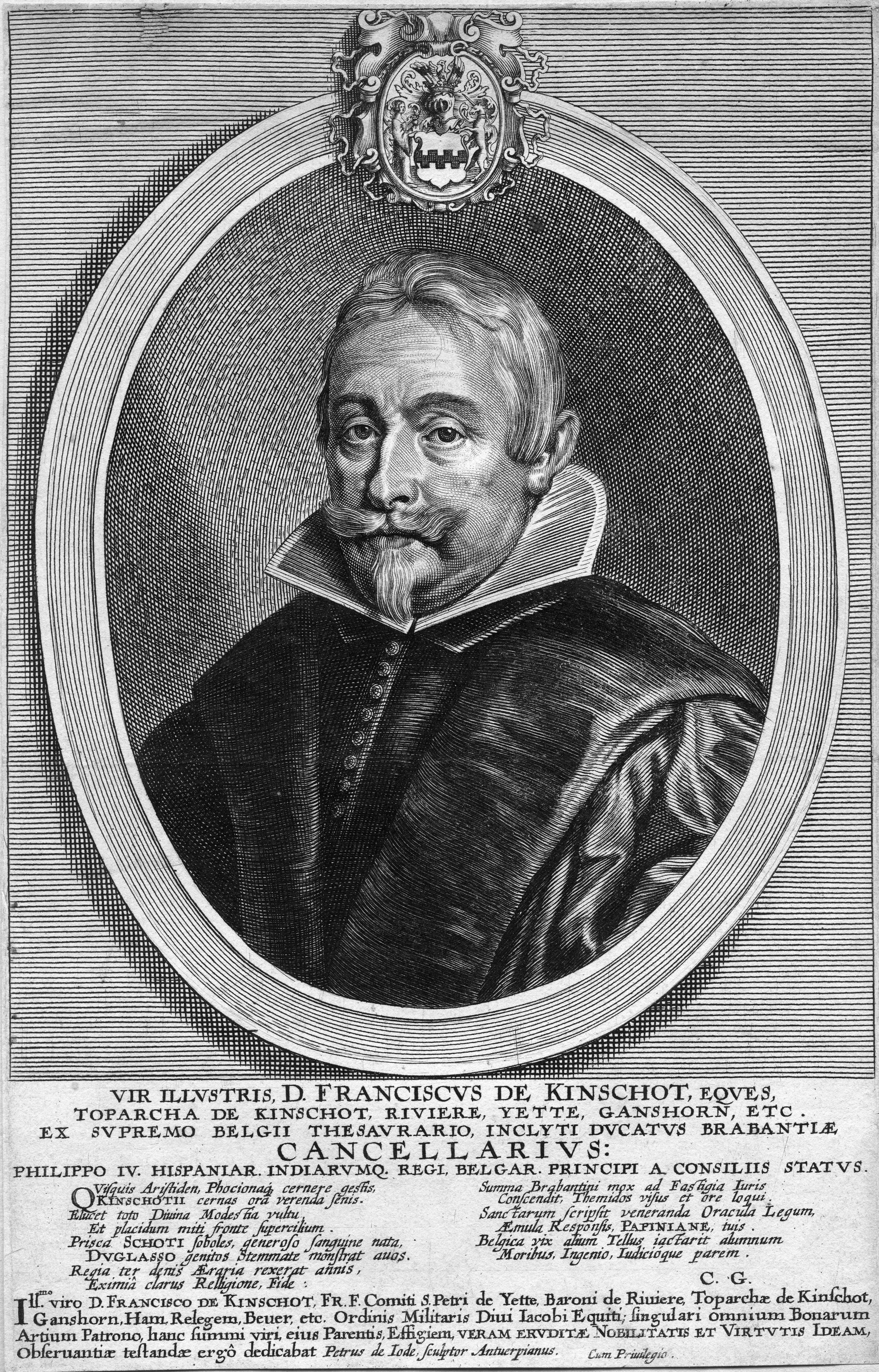 portrait gravé